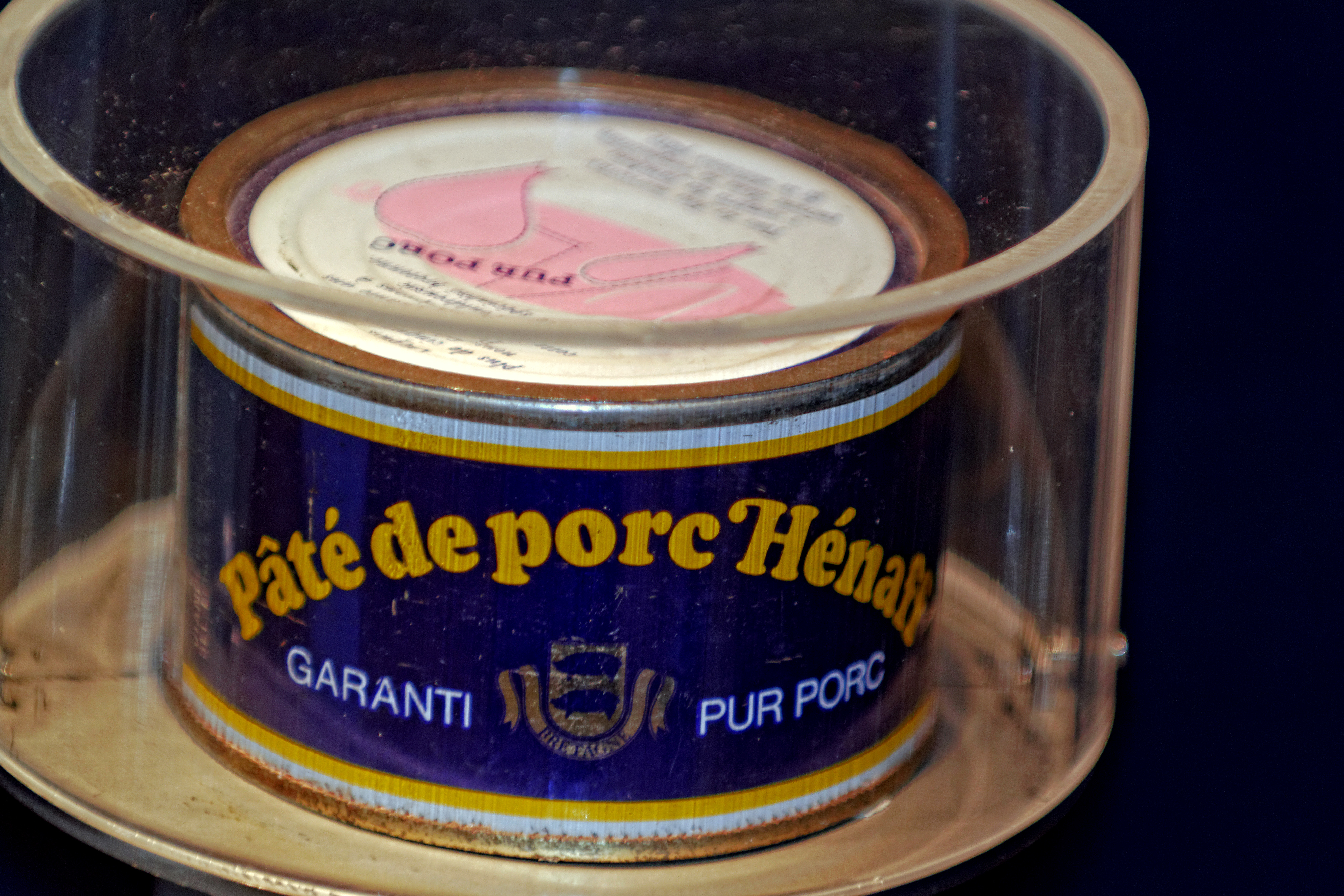 Boîte du Pâté Hénaff exposée à la Maison du Pâté Hénaff à Pouldreuzic.